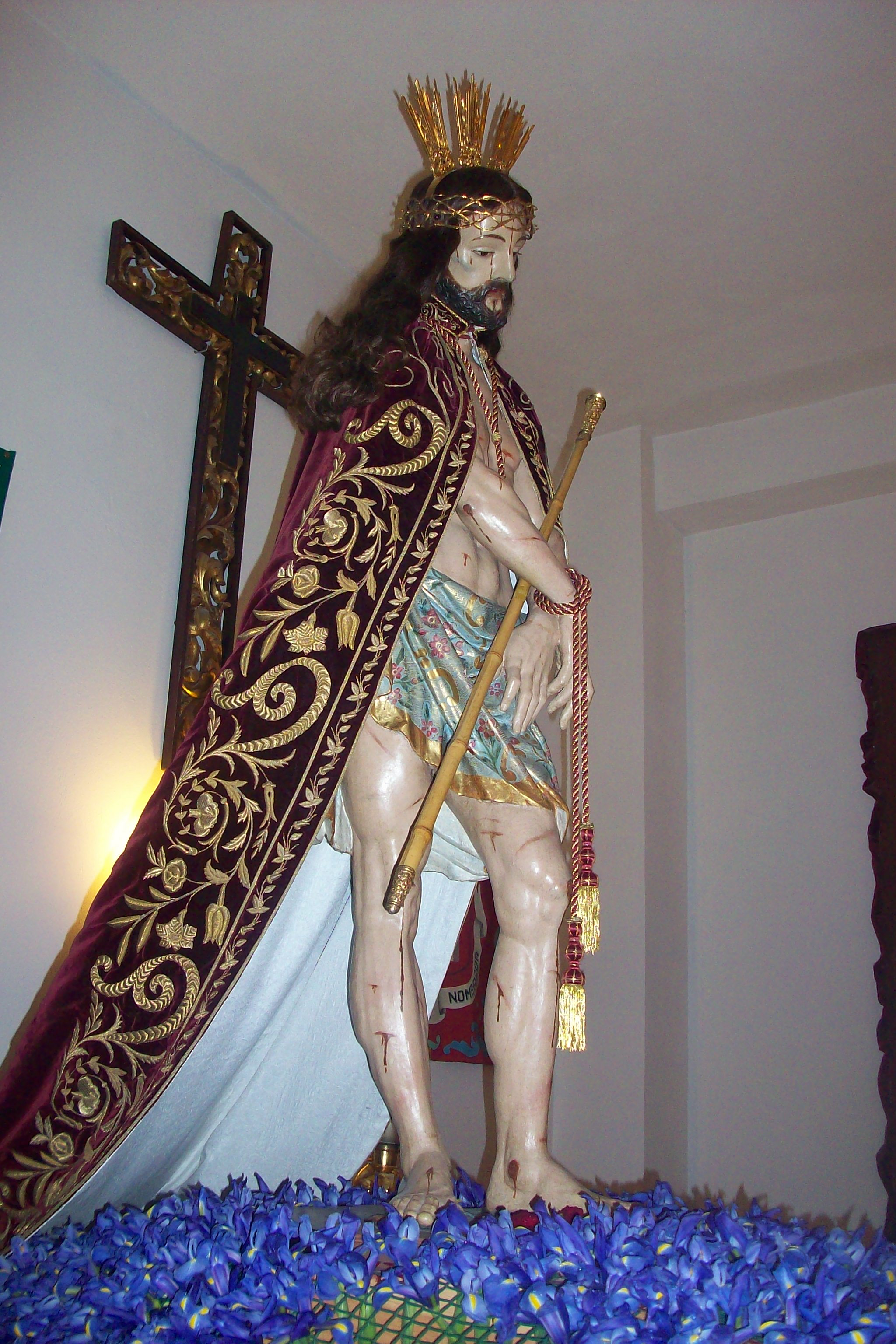 Talla del Cristo de la Humildad (s. XVI) propiedad de la Ilustre Cofradía de la Humildad de Nuestro Señor Jesucristo y Nuestra Señora de los Dolores del Rosario de Baeza (Jaén)